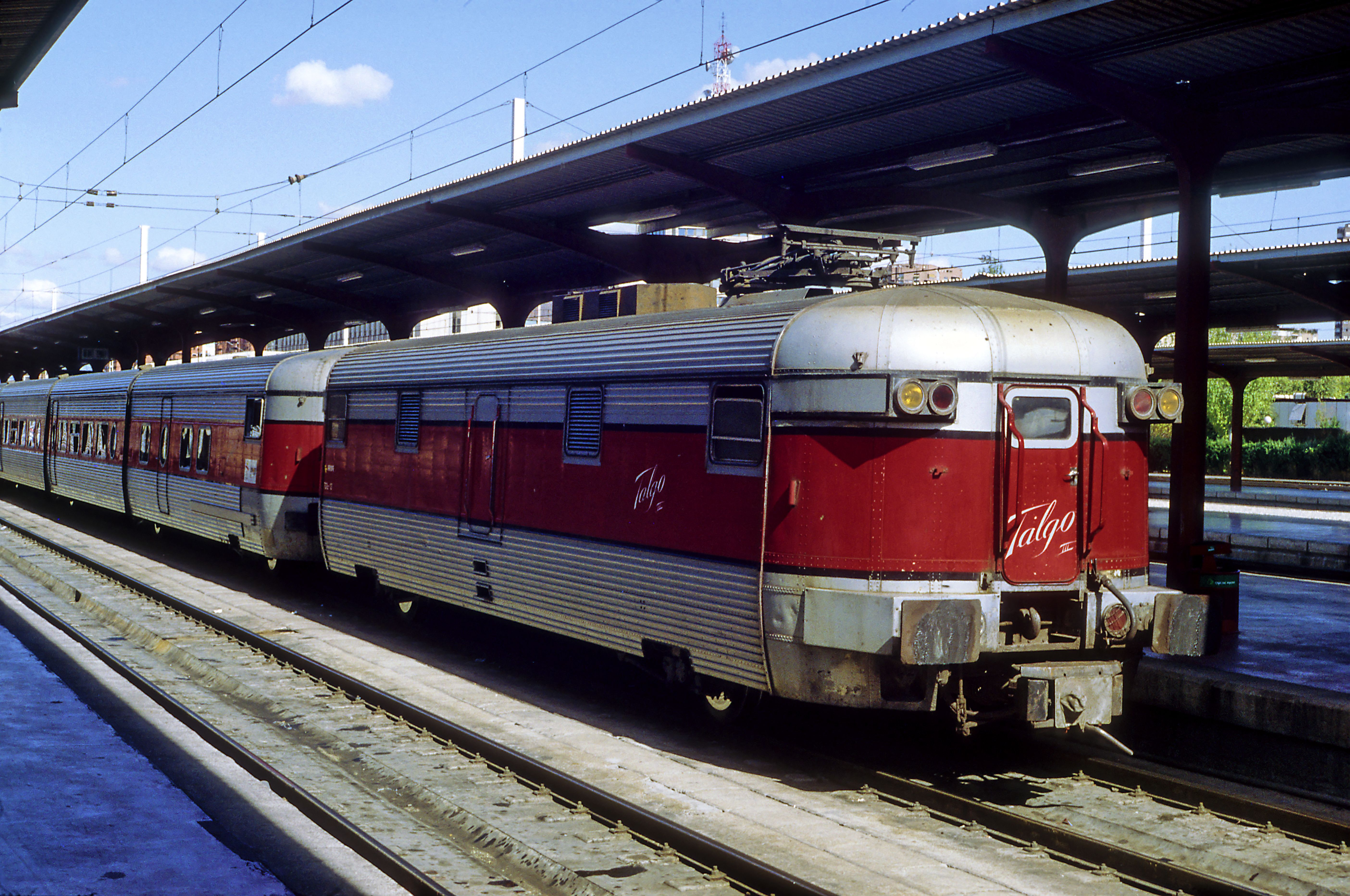 Generatorwagen für Talgo III im Bahnhof Madrid Chamartín